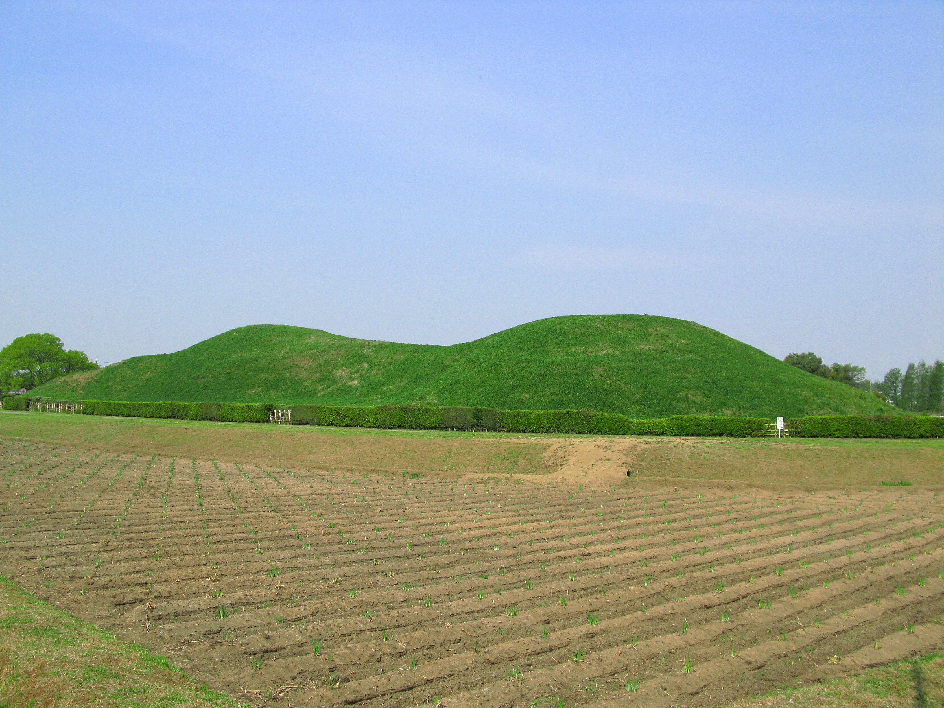 Saitama Kofungun, Gyoda, Saitama, Japan